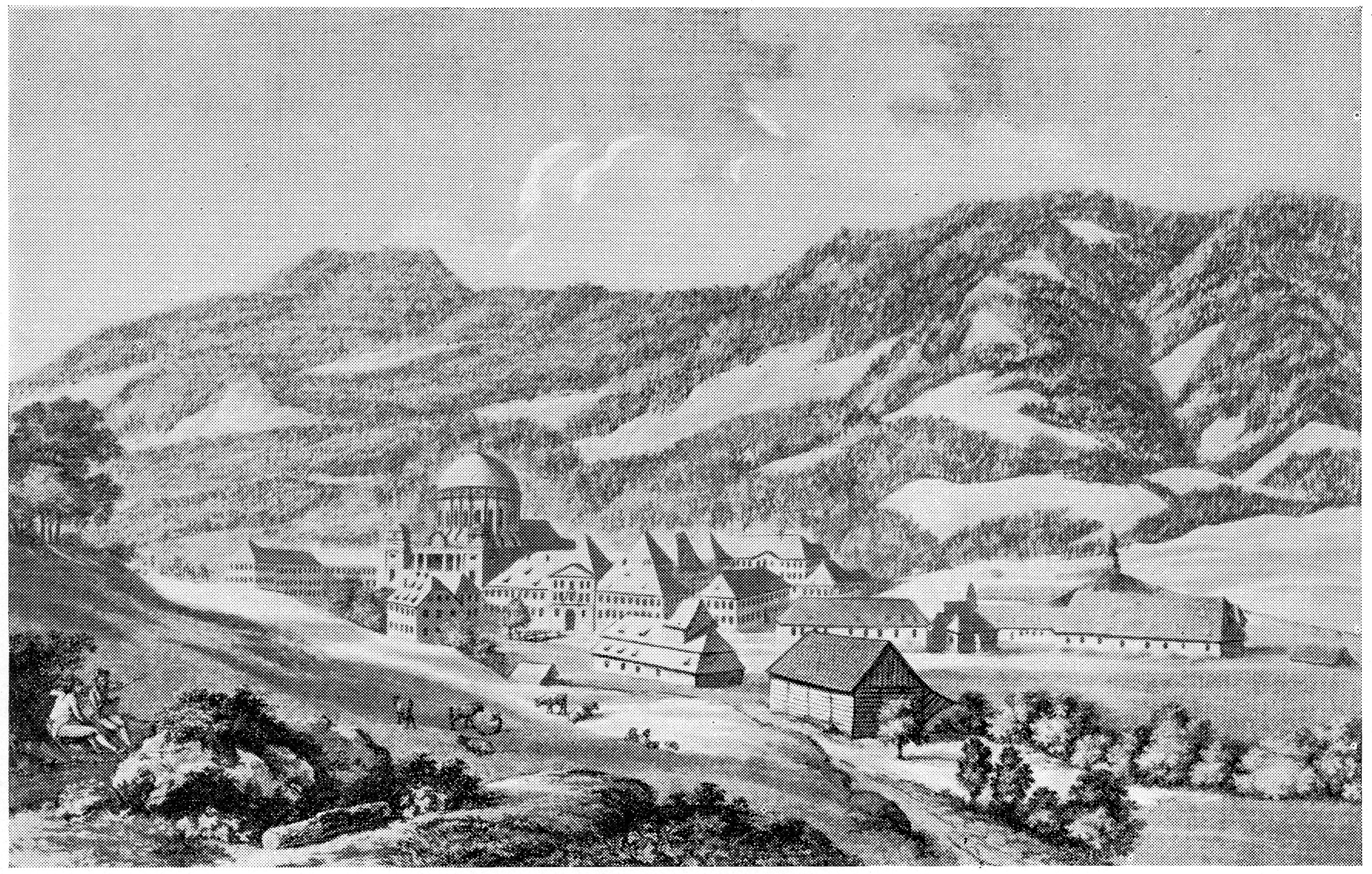 Blick aufs Kloster St. Blasien (Kupferstich).